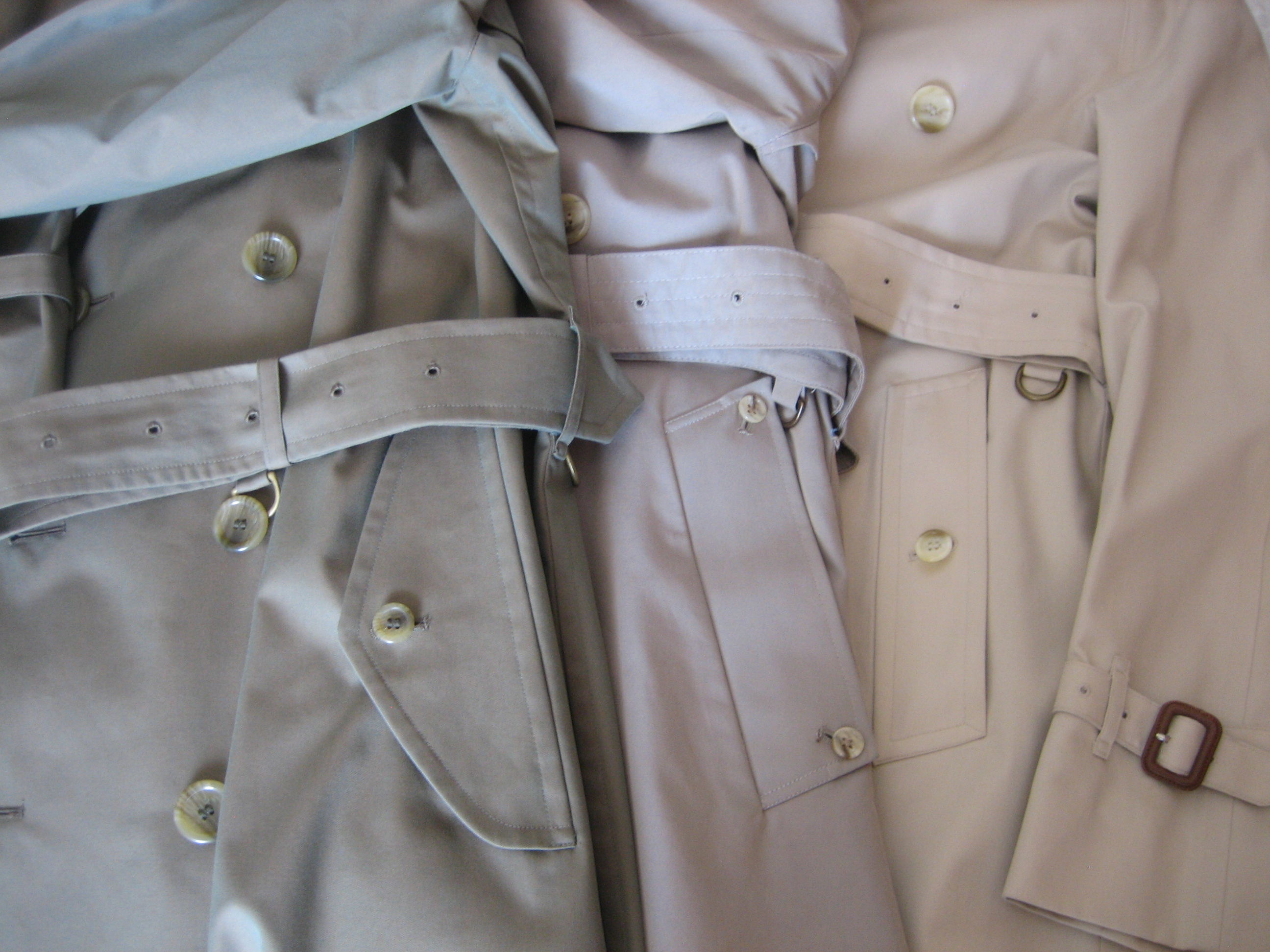 Tre tipi di tasca del trench, si notano anche gli anelli di ottone della cintura, e la fibbia di pelle e le asolette cucite